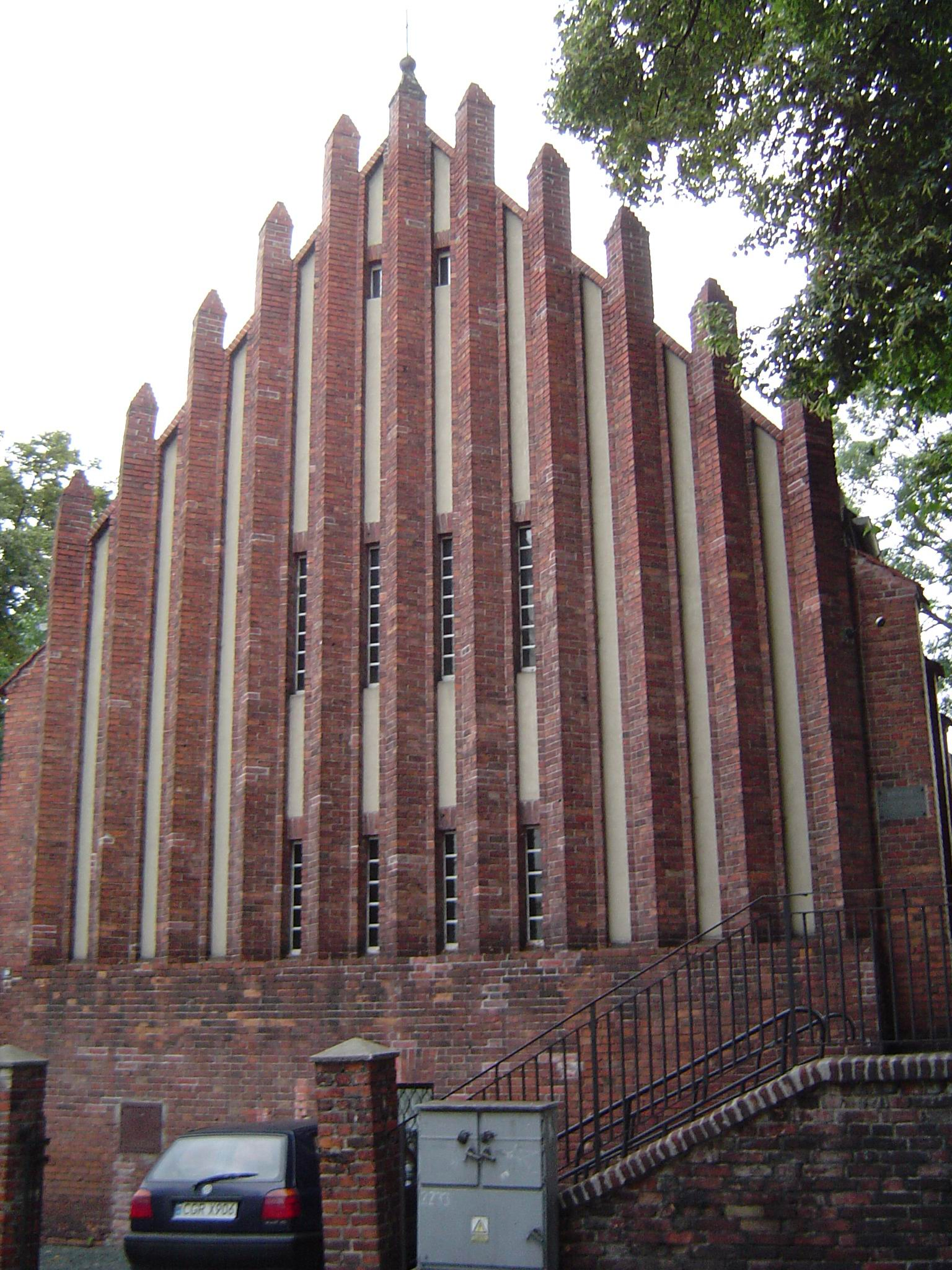 Kościół ewangelicki św. Jana w Grudziądzu